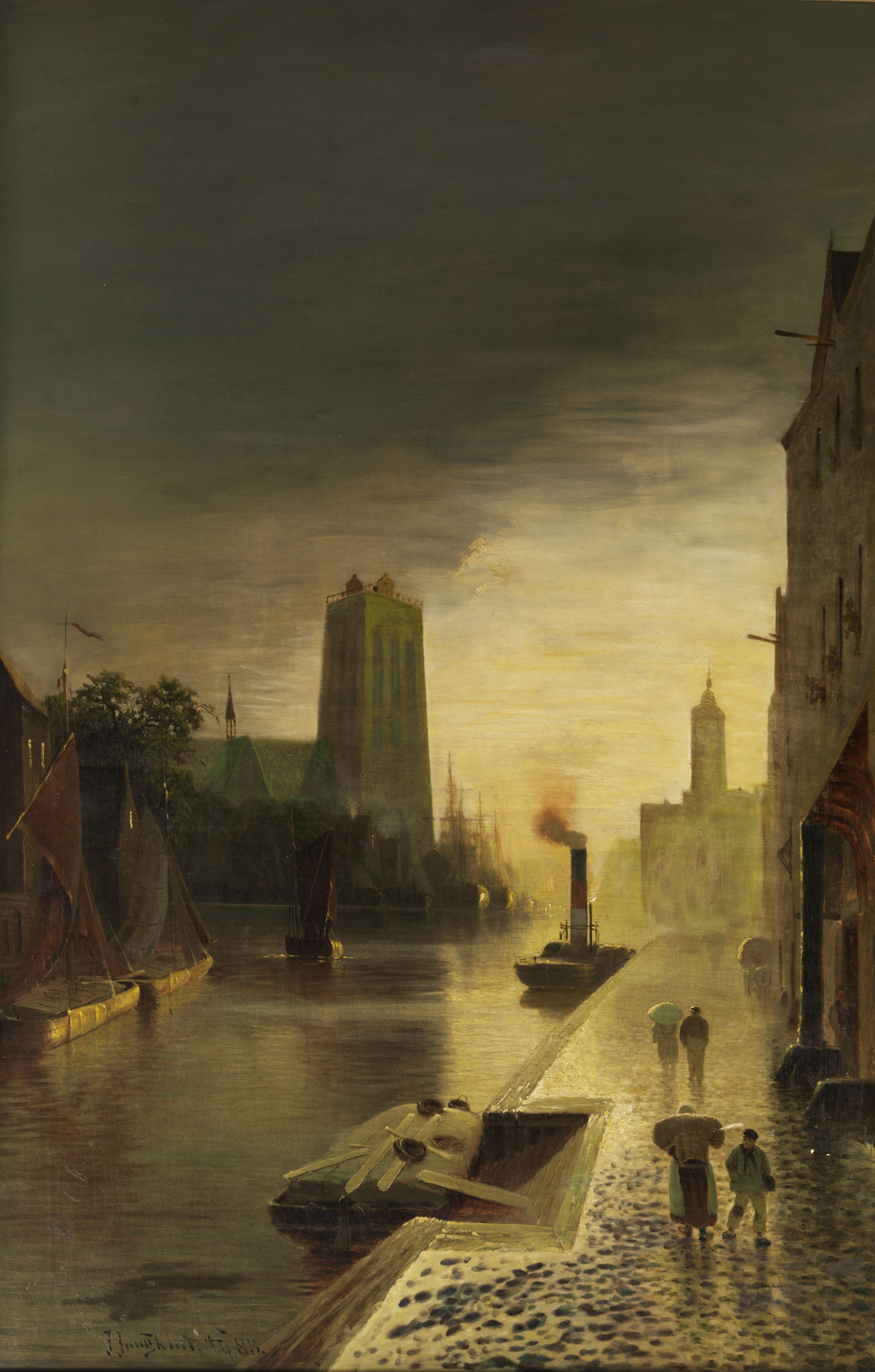 Ansicht von Gent. Öl auf Leinwand. 121 x 80 cm. Links unten signiert und datiert „1883“.